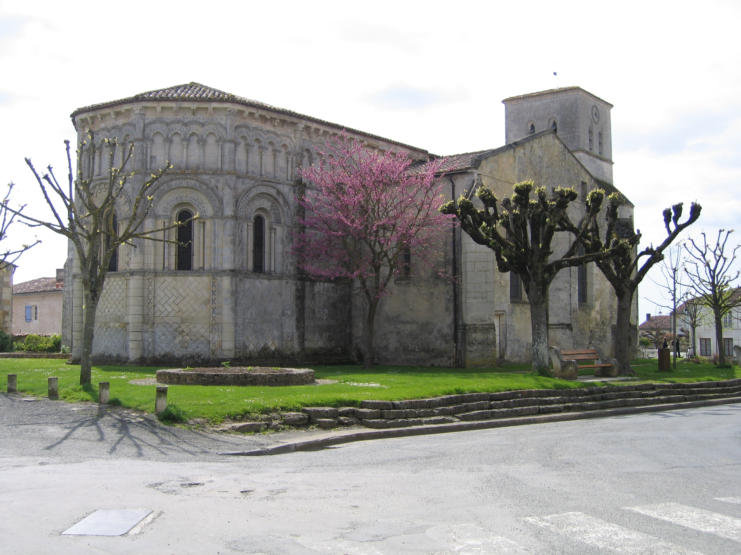 L'église romane de Rioux